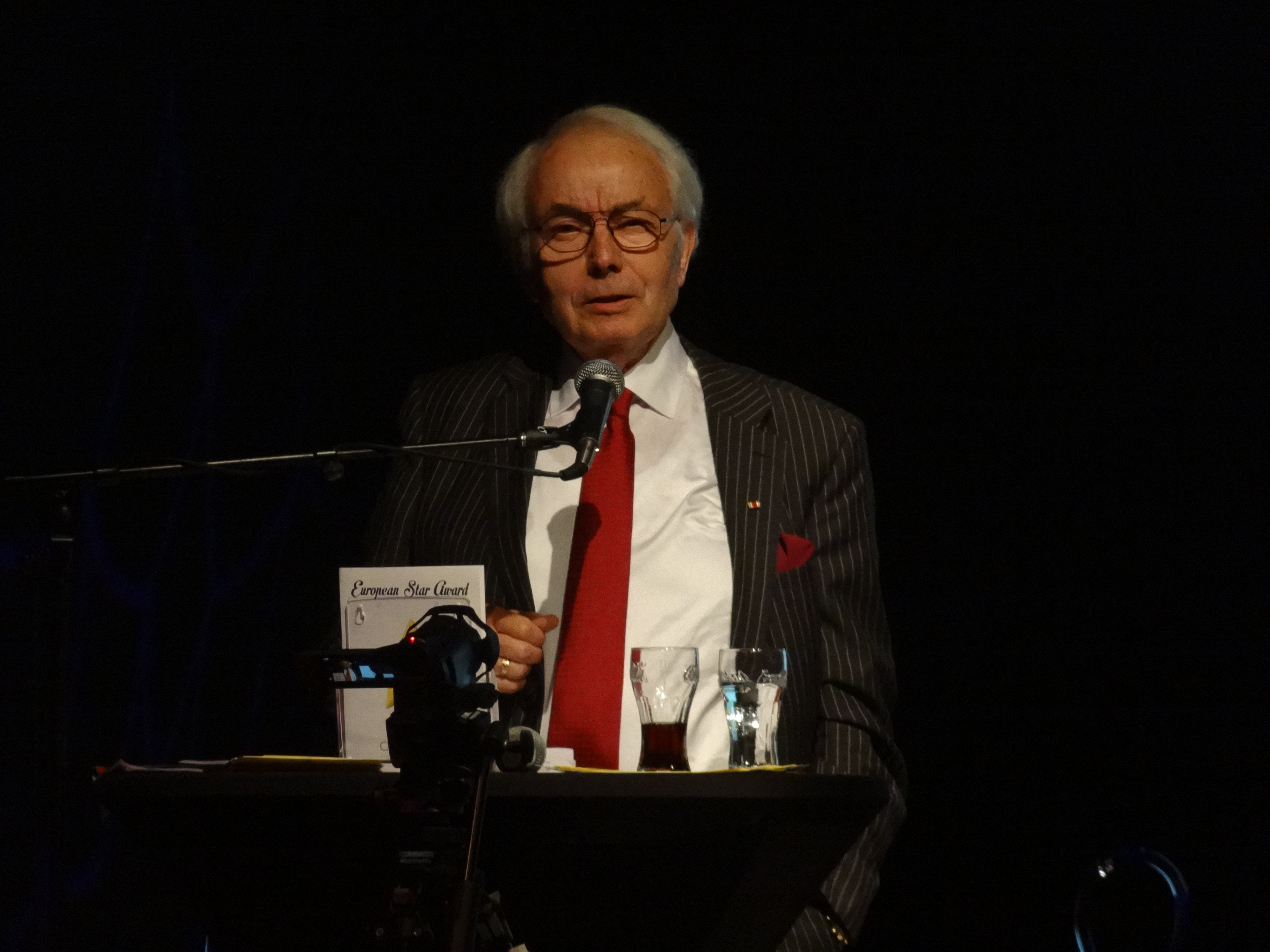 Werner Stengel en septembre 2017, à l'occasion de la cérémonie de European Star Award.